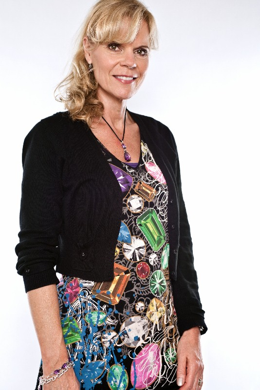 Jennifer Smit